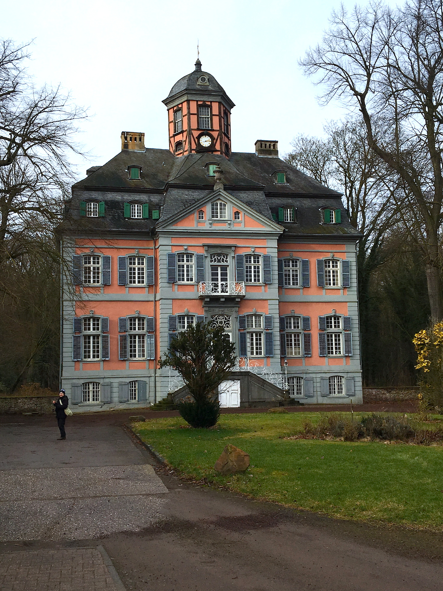 Замок Арф в районе Роггендорф/Тенховен (Кёльн). 4 февраля 2017.